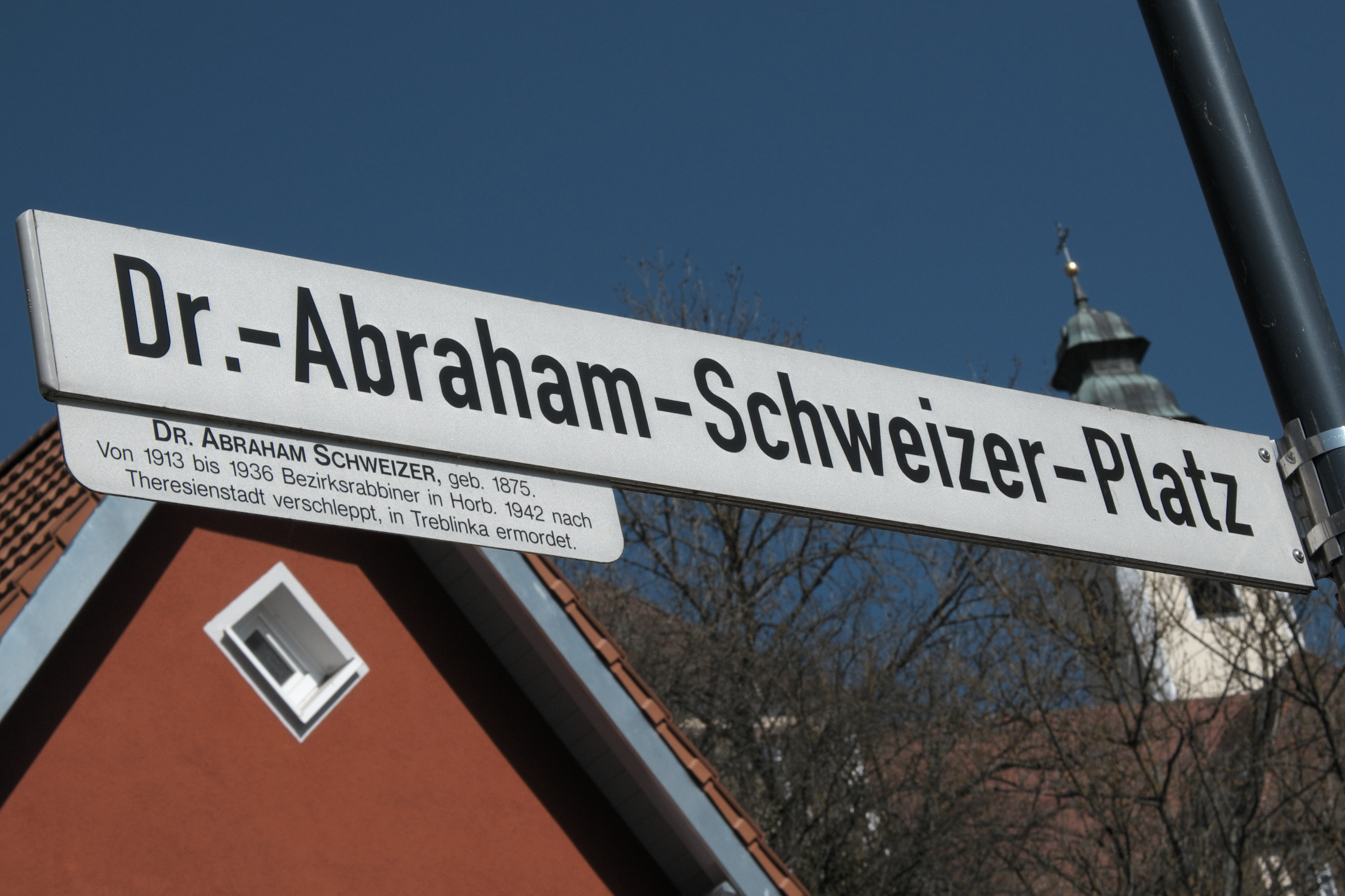 Straßenschild Dr.-Abraham-Schweizer-Platz in Horb am Neckar im Landkreis Freudenstadt (Baden-Württemberg/Deutschland), benannt nach Abraham Schweizer